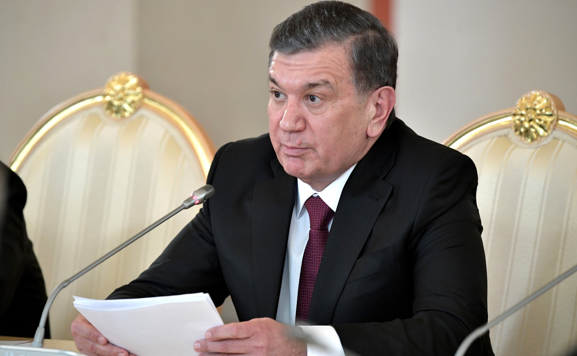 Президент Узбекистана Шавкат Мирзиёев